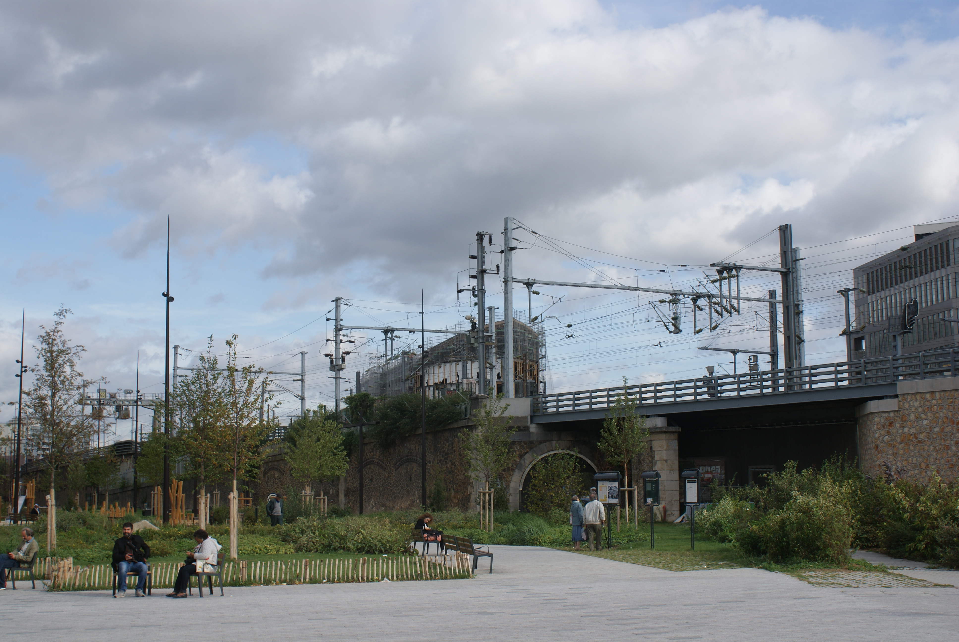 Parvis de la Gare Rosa-Parks et rails de la Petite Ceinture encastrées dans les pavés. Le faisceau ferroviaire de la gare de l'Est passe au-dessus des voies. Le jardin-promenade Cesária-Évora est visible.